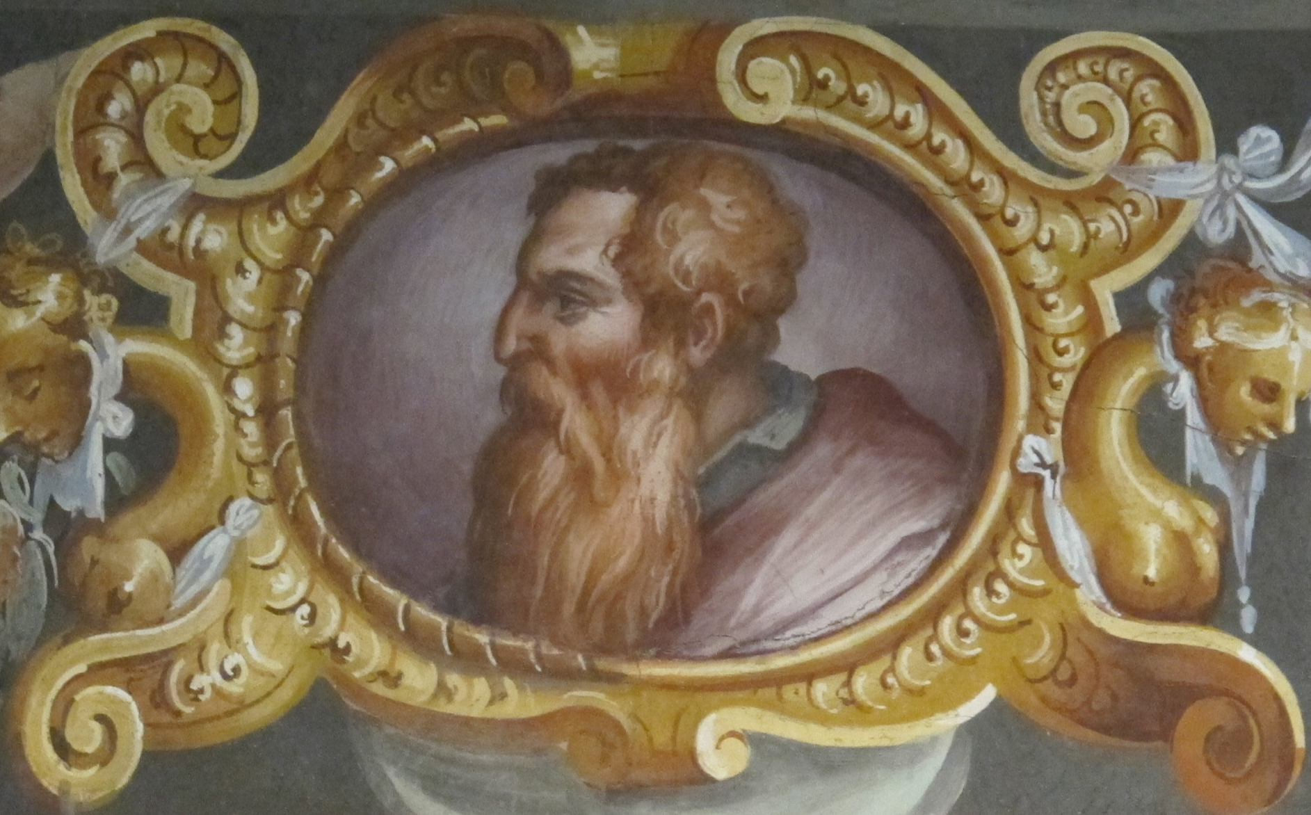 Casa vasari FI, salone, ritratti a, rosso fiorentino frontal view